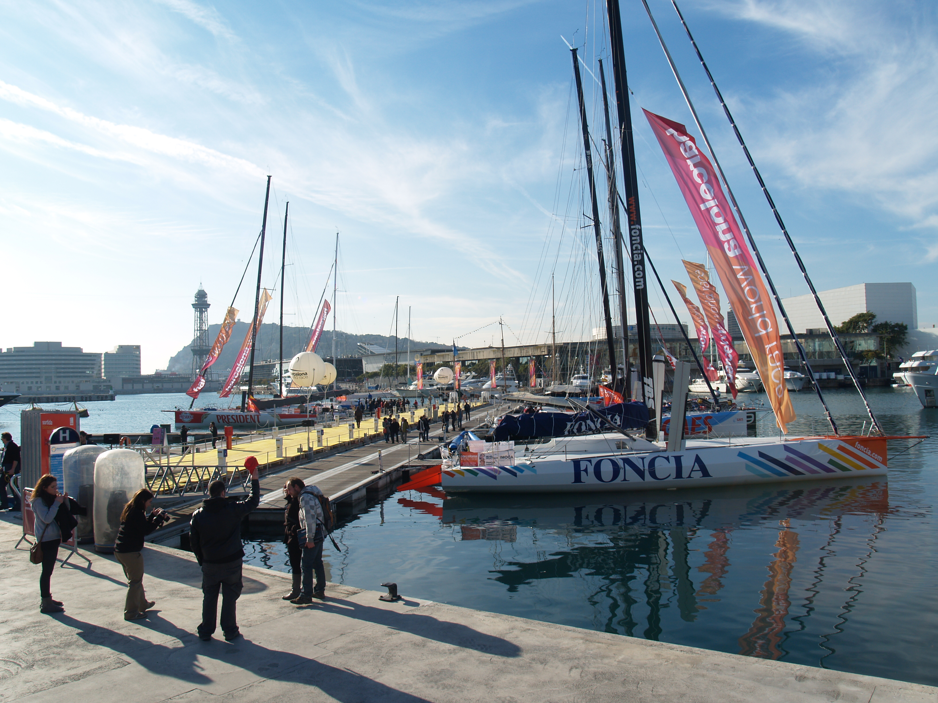 PC190293